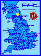 Risingham Lec'hiadur